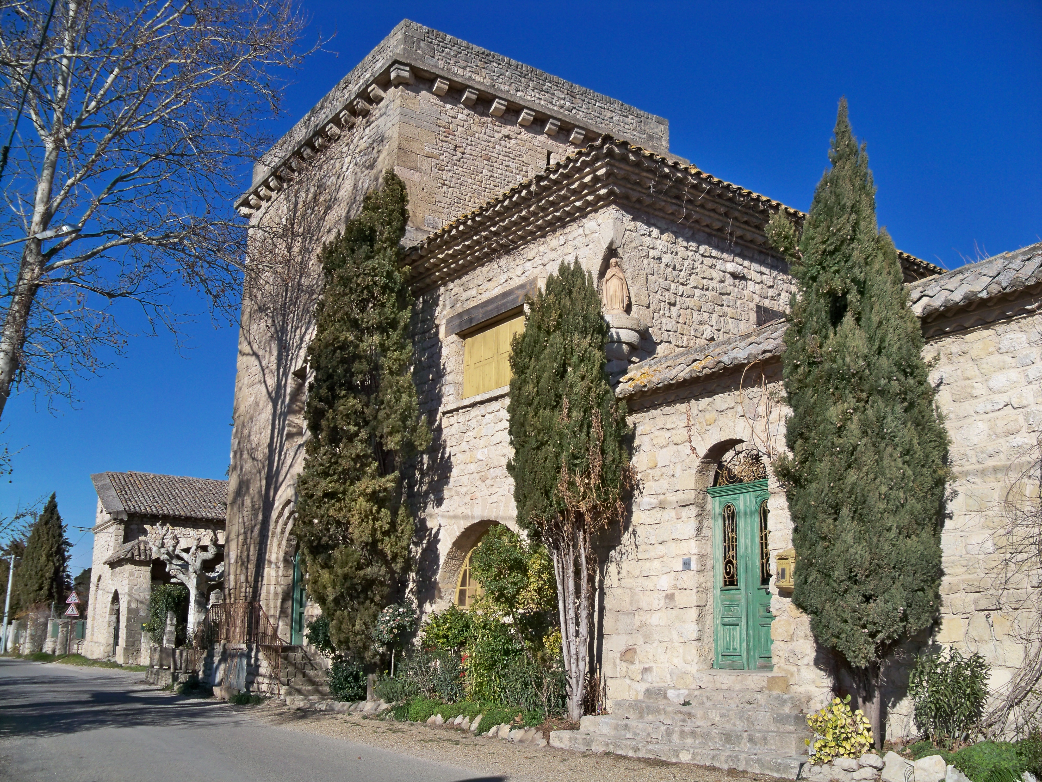 Chateau de Velorgues (hameau de l'Isle sur la Sorgue)